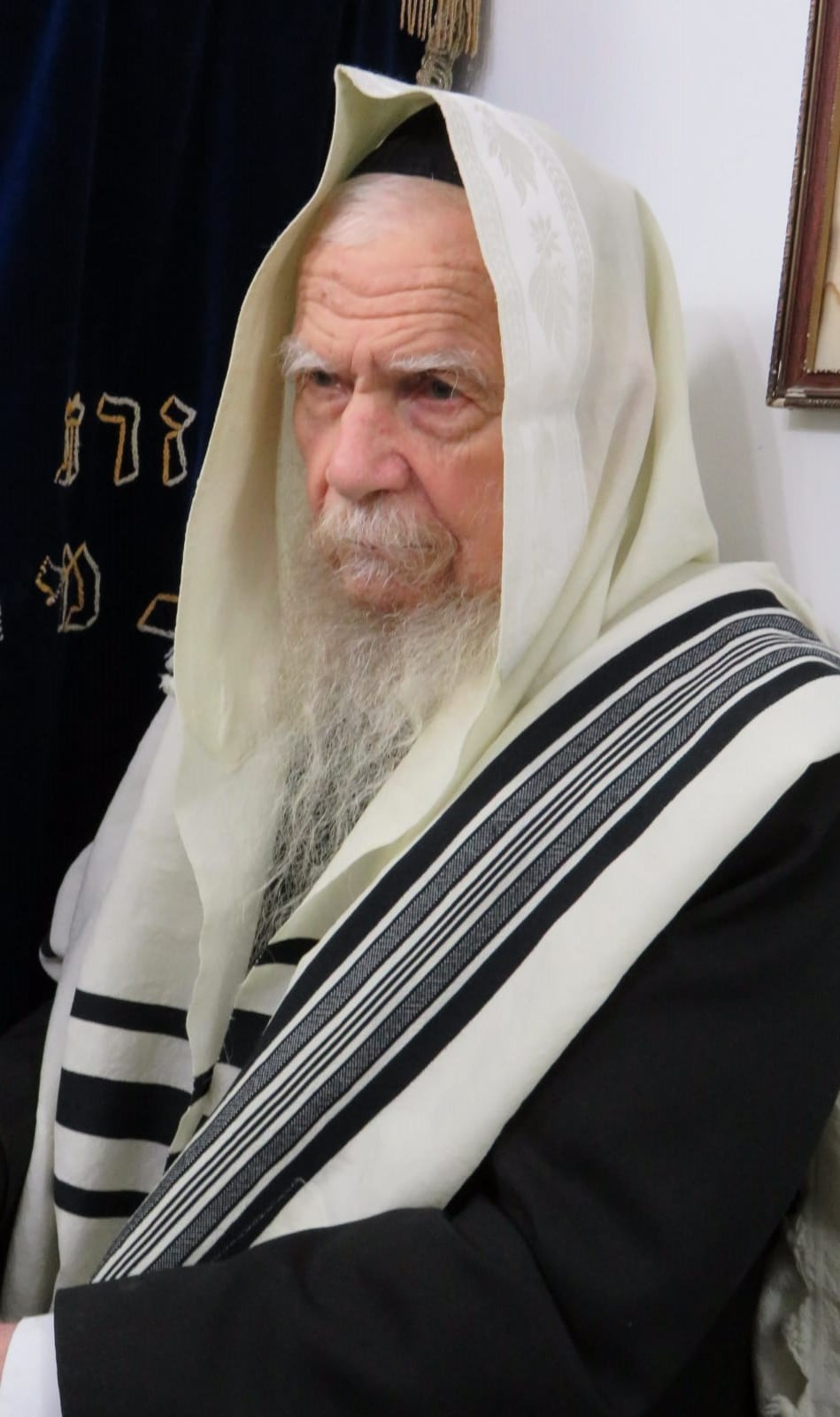 רבי גרשון אדלשטיין